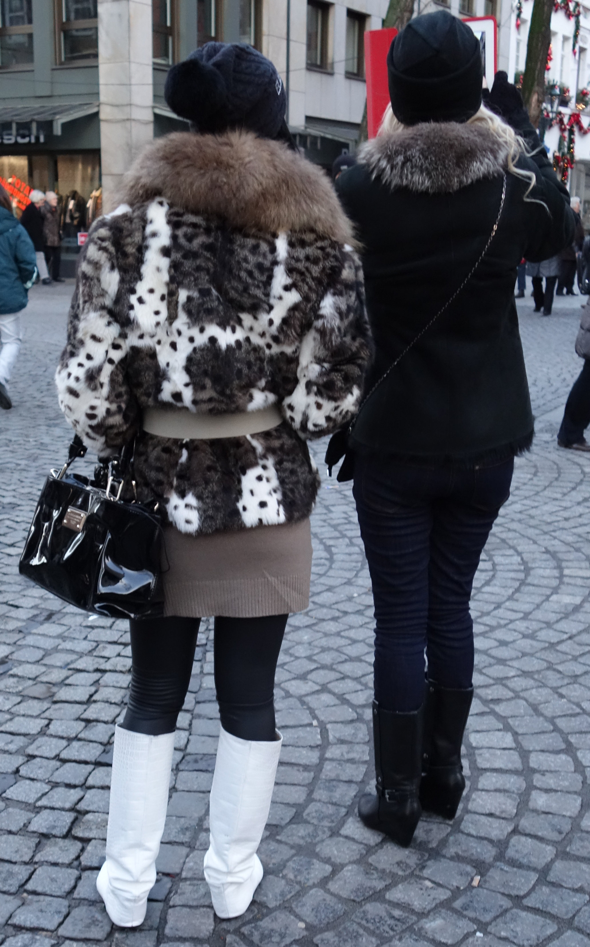 Links Katzenjacke, bedruckt mit Fleckenmuster, Fuchskragen. 2013 In Düsseldorf. Anmerkung: Vermutlich asiatische Arbeit, nicht EU-Bürger, eventuell Russland.